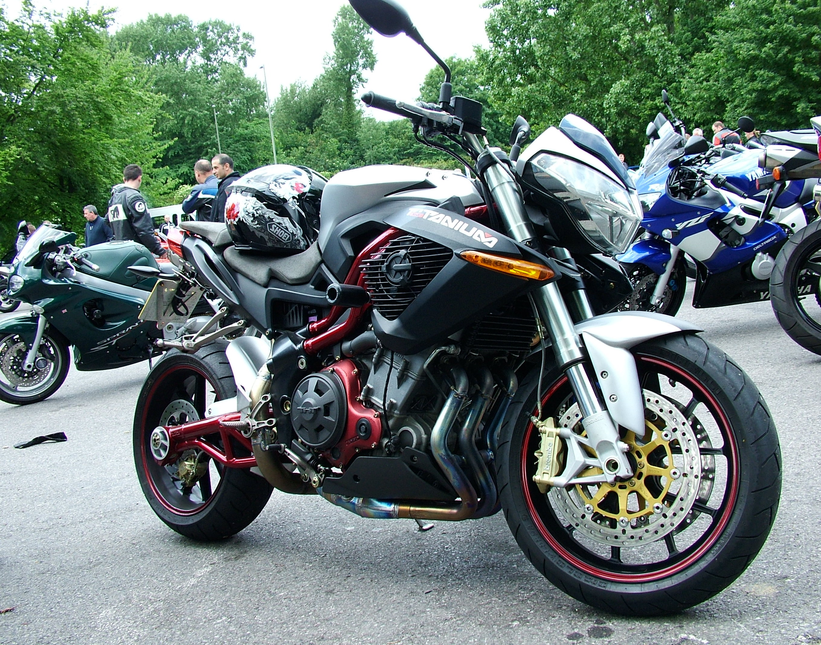 Benelli 1130 TNT Titanium